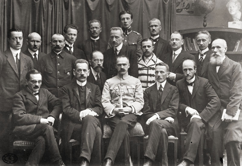 Rząd polski zaprzysiężony 18 listopada 1918 r. z J. Moraczewskim na czele. Od lewej siedzą: S. Thugutt, J. Moraczewski, K. Prauss (w drugim rzędzie), J. Piłsudski, L. Supiński, L. Wasilewski, T. Nocznicki (stoi w pierwszym rzędzie). Stoją od lewej: B. Ziemięcki, T. Arciszewski, B. Stolarski (w białej sukmanie), J. Iwanowski.